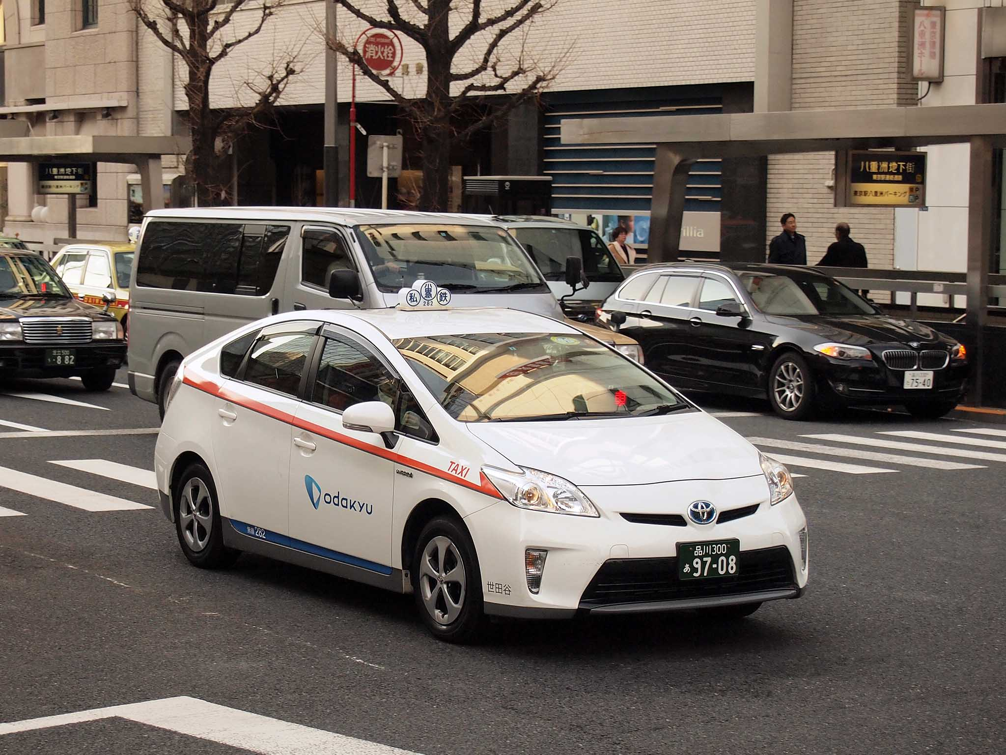 小田急交通のトヨタ・プリウスVSEタクシー。30系プリウスでは小田急電鉄50000形ロマンスカーVSEを意識した白地にオレンジとグレーの帯を巻き、裾には通勤型車両の青帯が加わる。 登録番号：品川300あ9708 撮影地：東京都中央区八重洲